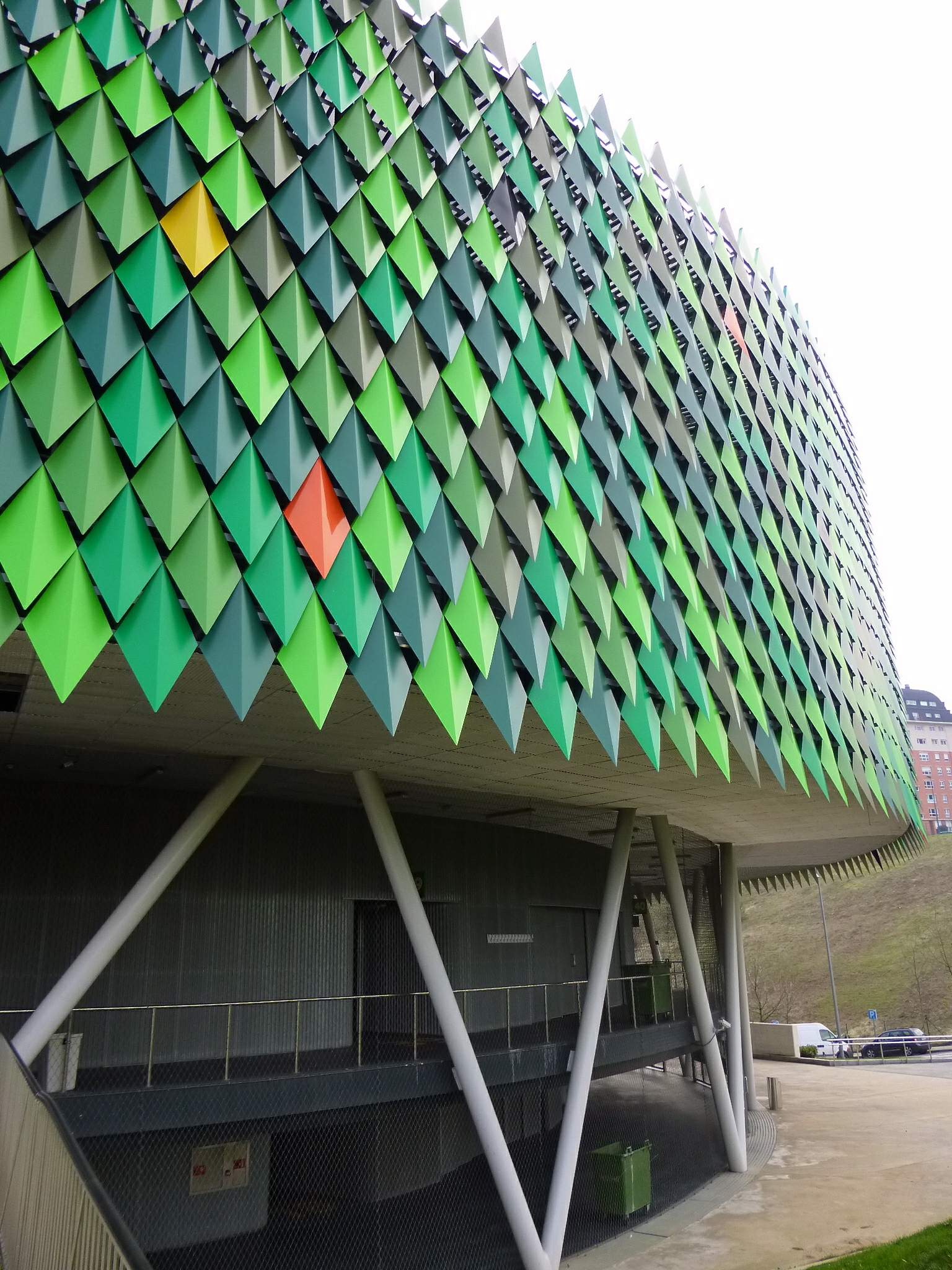 Pabellón de Deportes Bilbao Arena (Miribilla, Bilbao)